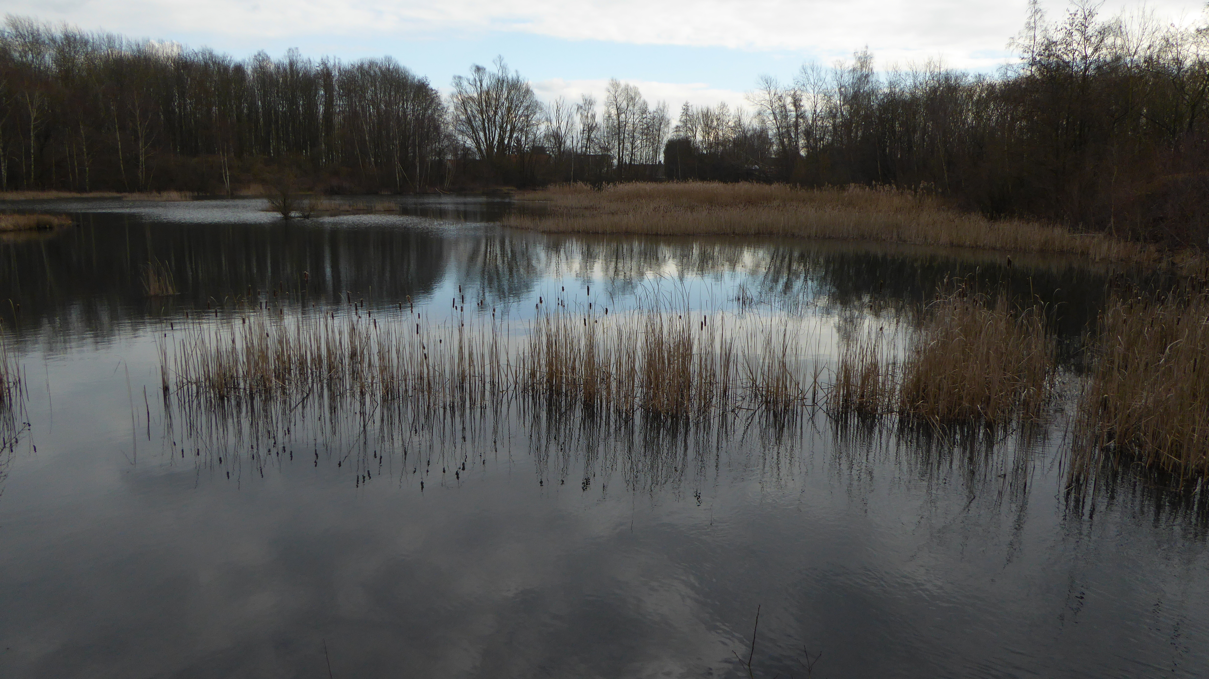 Les étangs de Wingles , Pas-de-Calais, Nord-Pas-de-Calais-Picardie France.